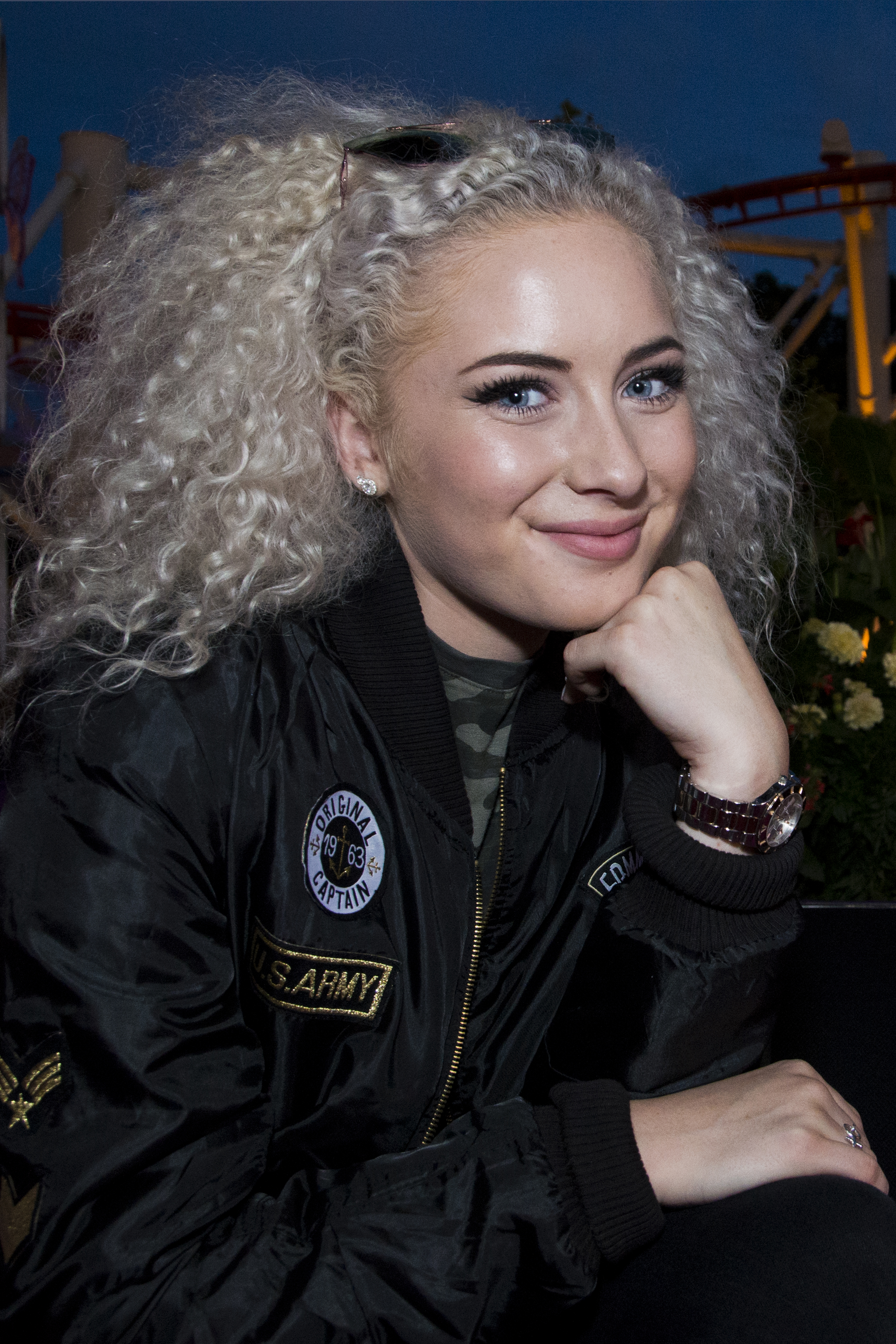 Wiktoria på Sommarkrysset, Gröna Lund i Stockholm